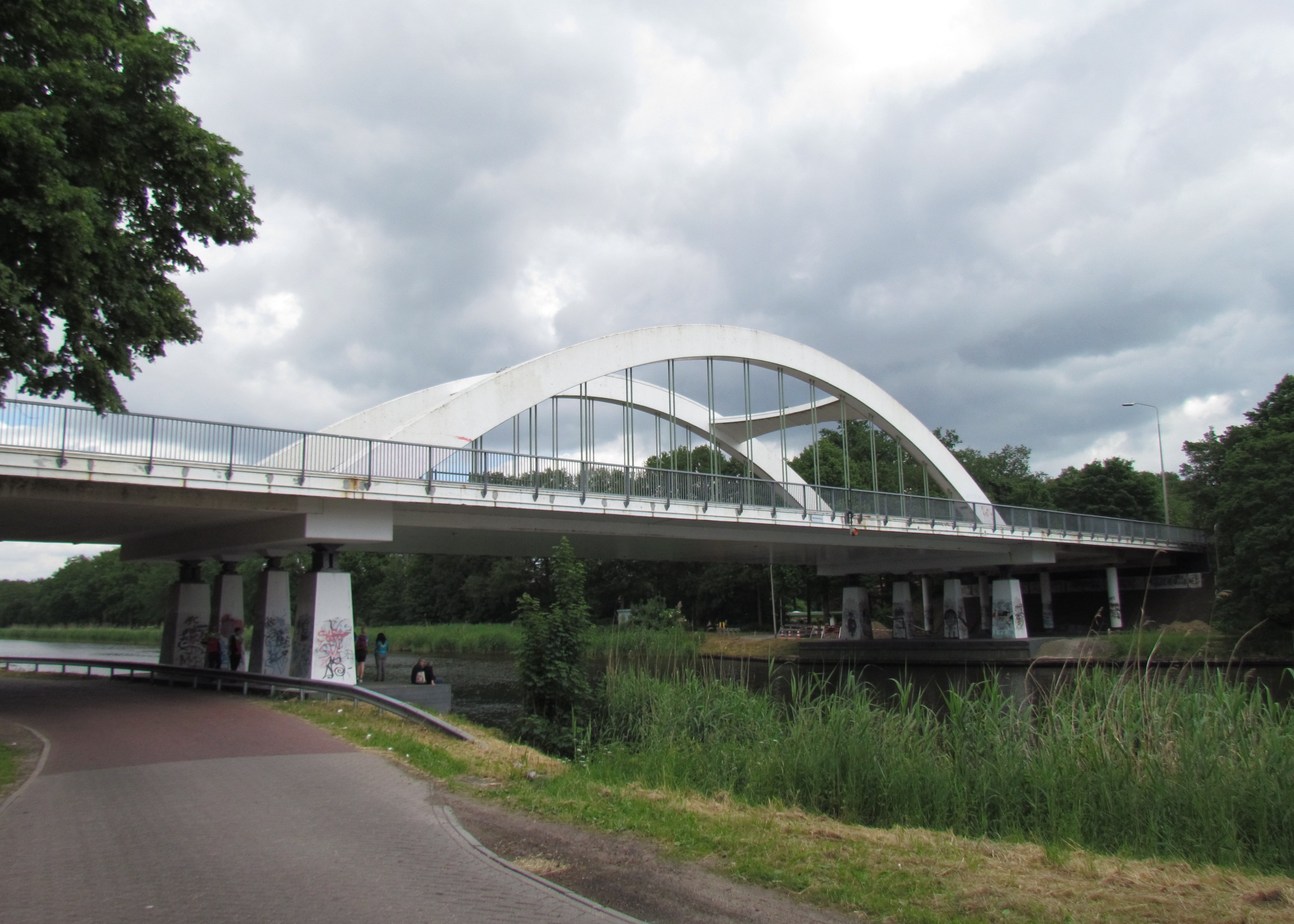 Wierdense brug over het Twentekanaal, tussen Almelo en Wierden